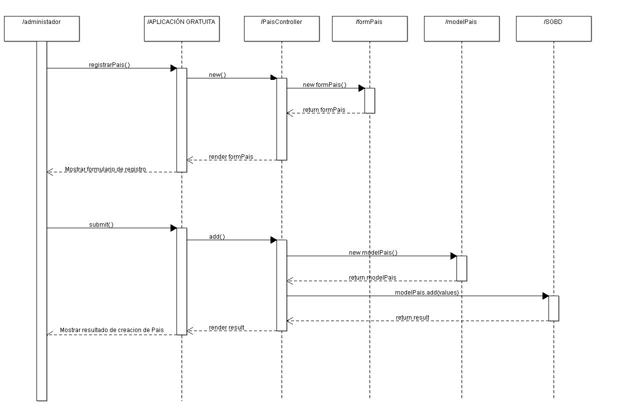 Diagrama de secuencia que muestra los pasos para ingresar un país y los actores que están involucrados en este proceso.